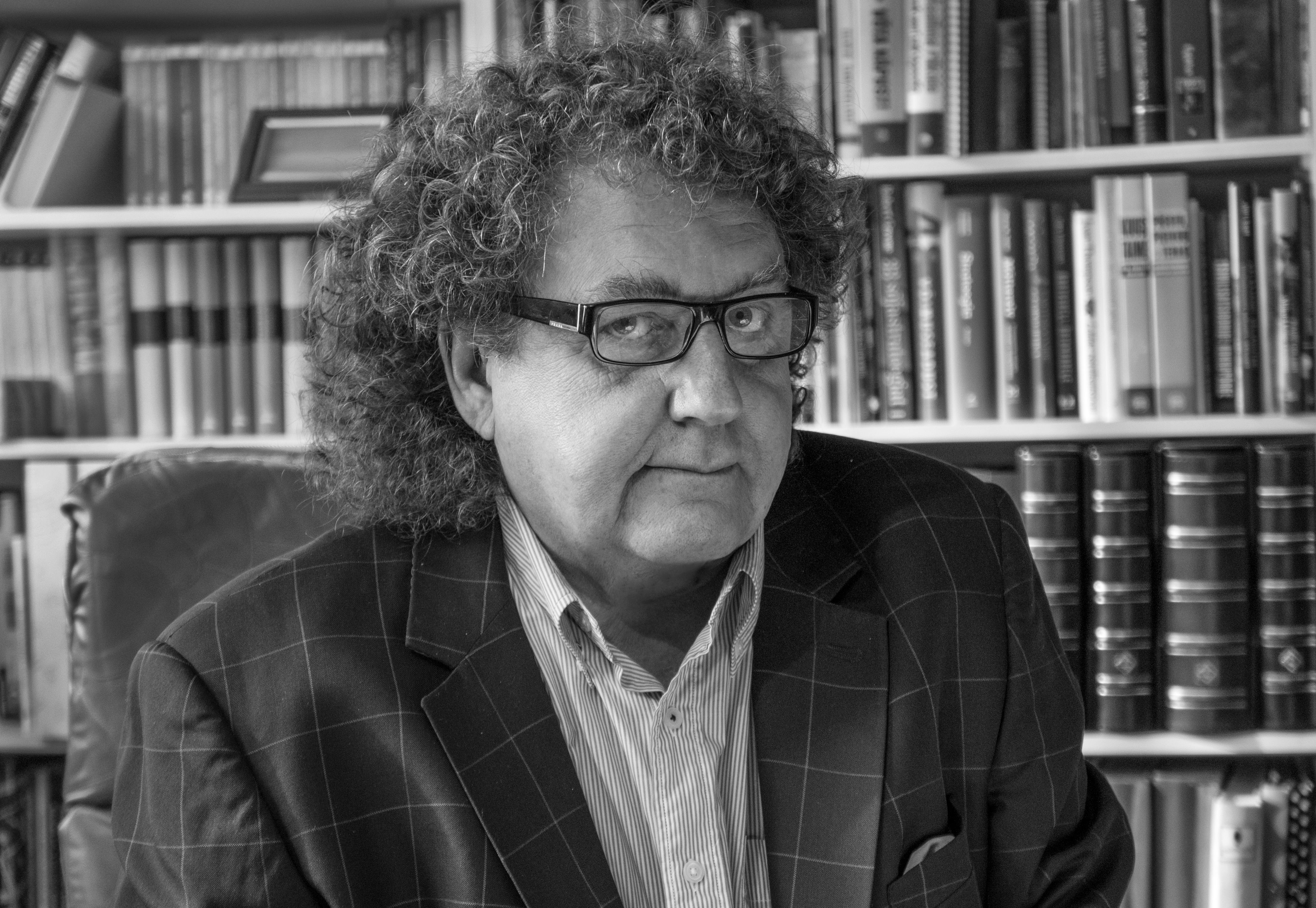 Foto